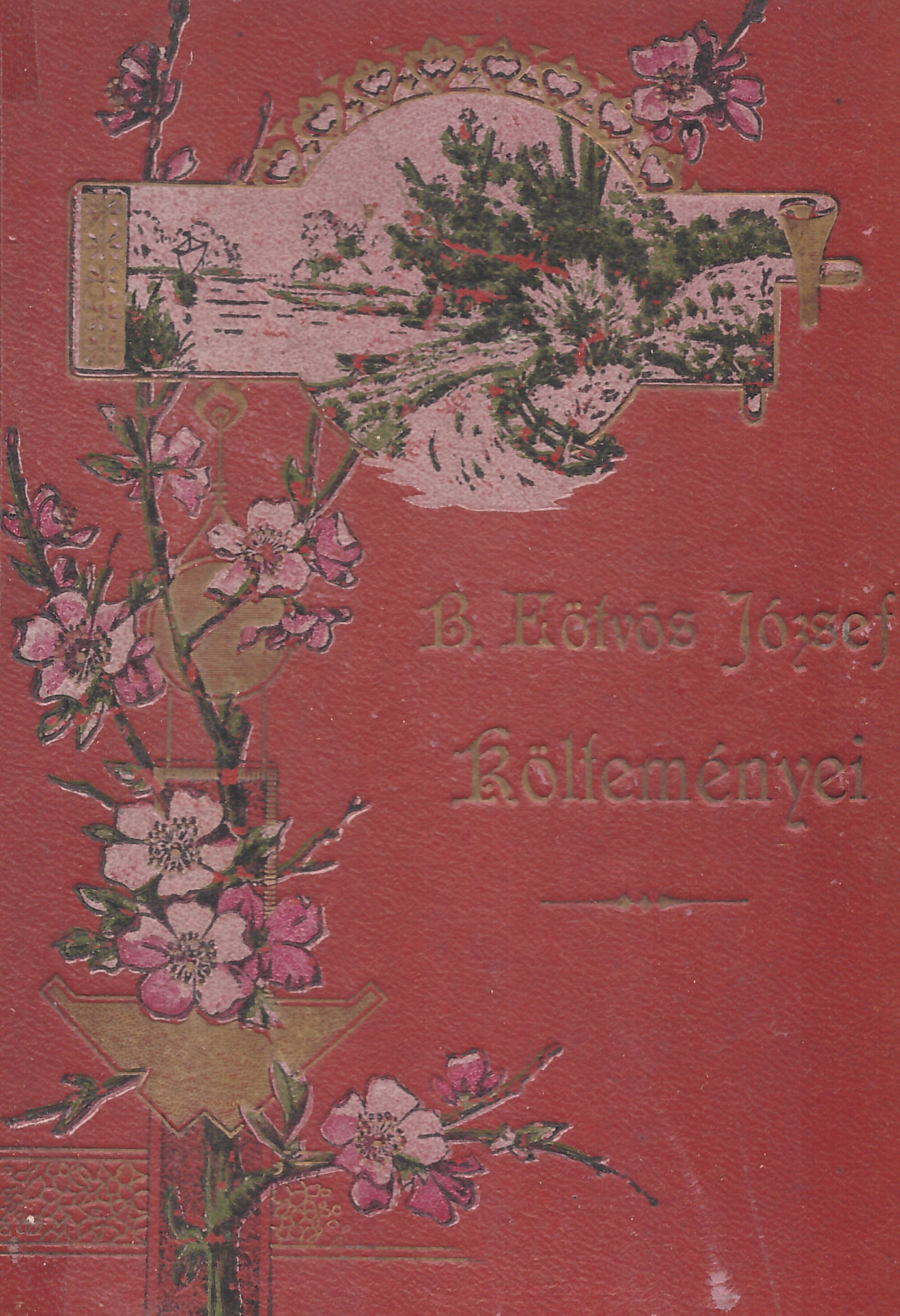 Eötvös József (1813-1871) költeményei (1880-as évekbeli kiadás)